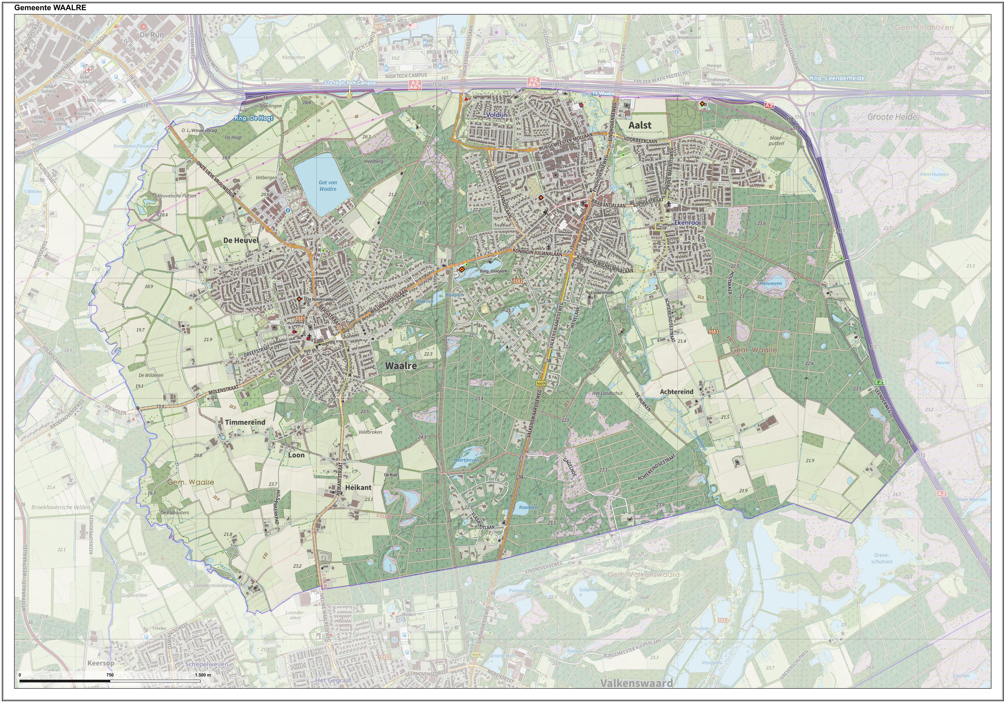 Topografische gemeentekaart. Resolutie: 400 pixels/km. Kaartbeeld samengesteld uit de open geodata van de Top10NL en Top25namen (Kadaster), Creative Commons-BY licentie. Gebouwvlakken uit open geodata BAG extract. Wegen uit de OpenStreetMap, OpenStreetMap community. Reliëfschaduw uit de Actuele Hoogtekaart AHN2. Samenstelling en kleurenschema: Jan-Willem van Aalst, met QGIS. Zie ook de Legenda.